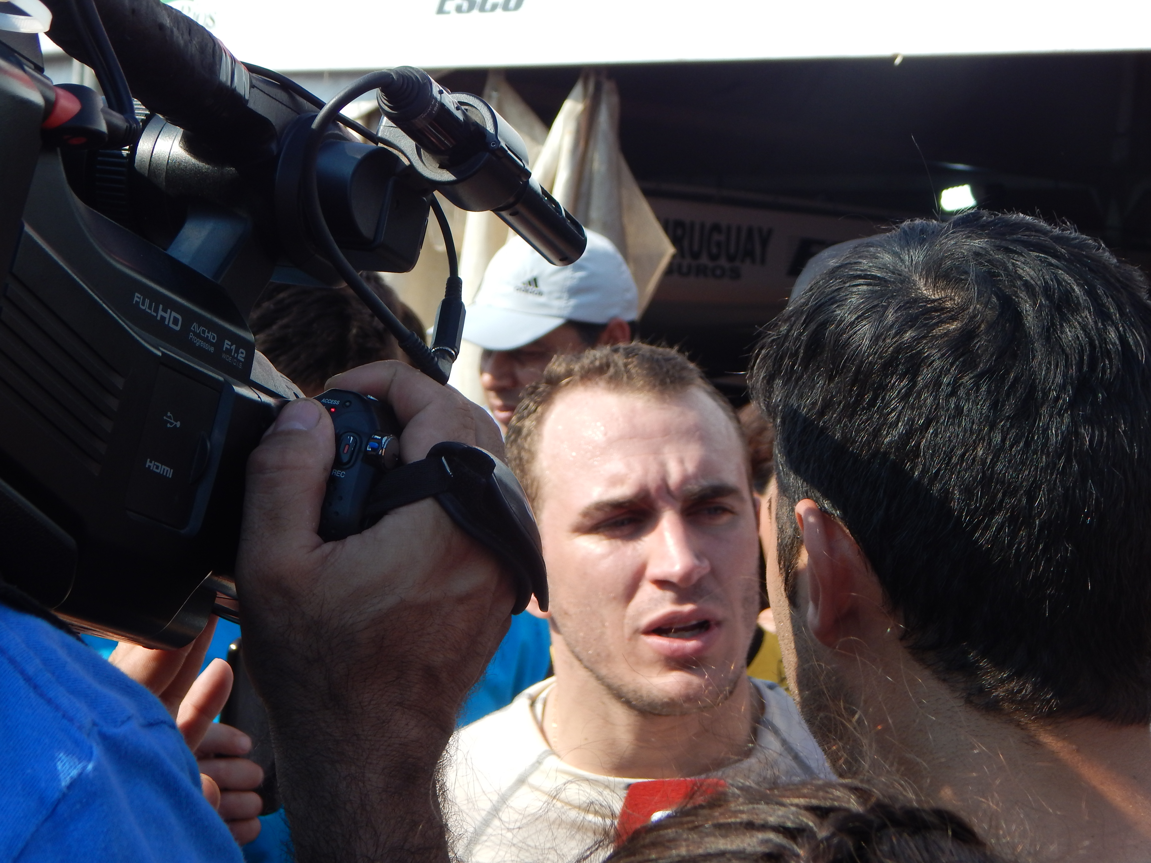 Mariano Werner, Autódromo de Paraná 2015